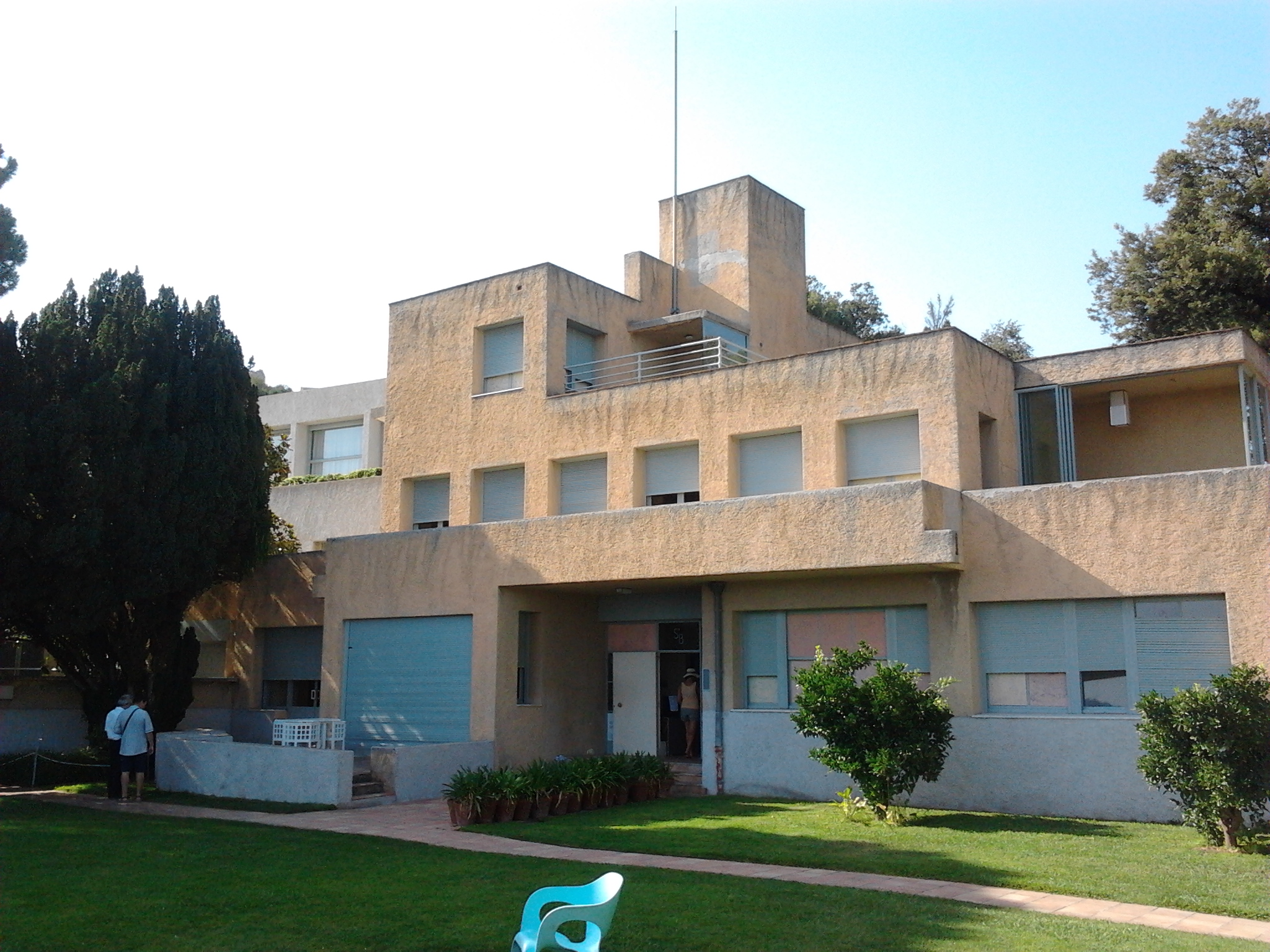 Entrée principale de la villa Noailles à Hyères, Var, France.